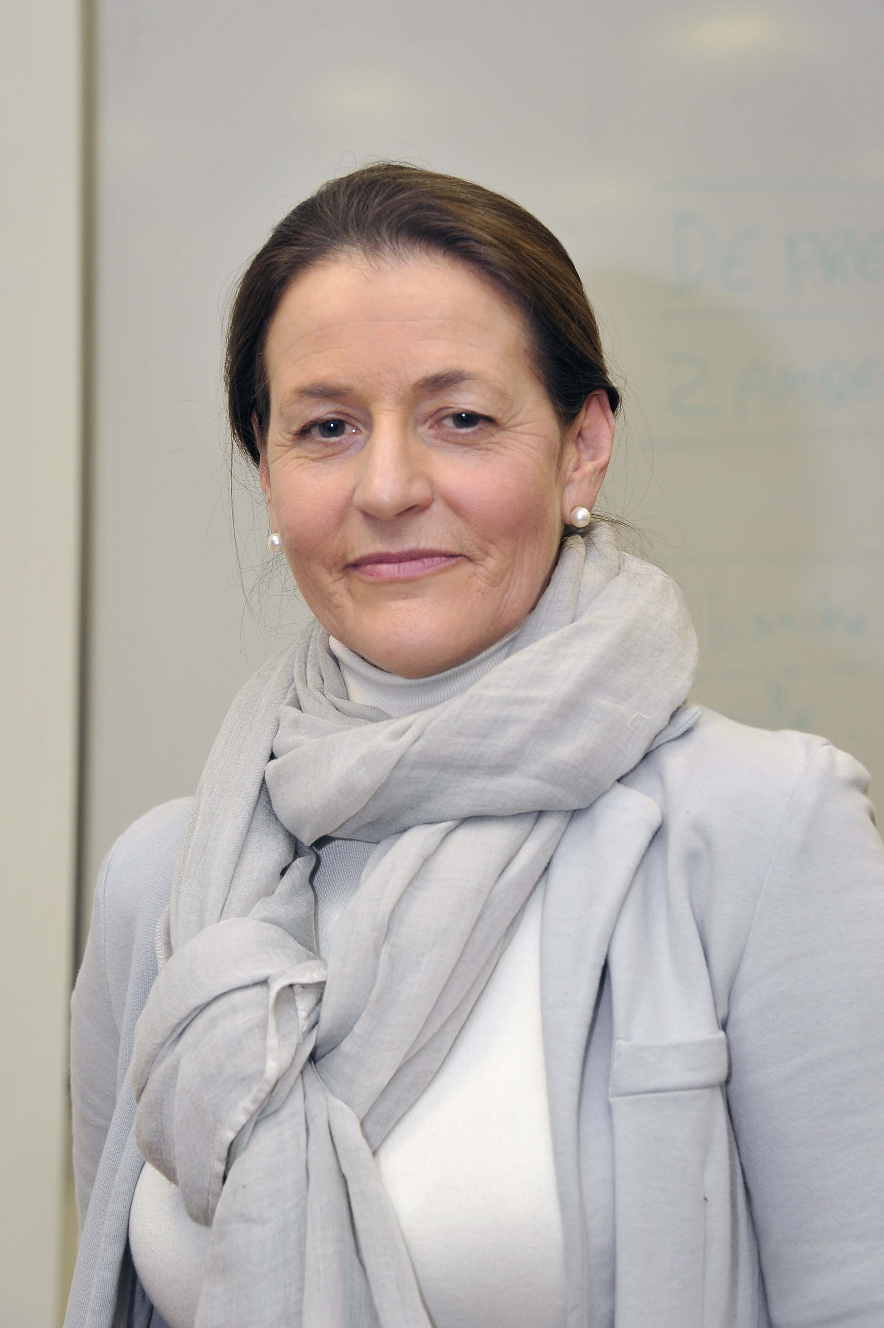 Daria de Pretis